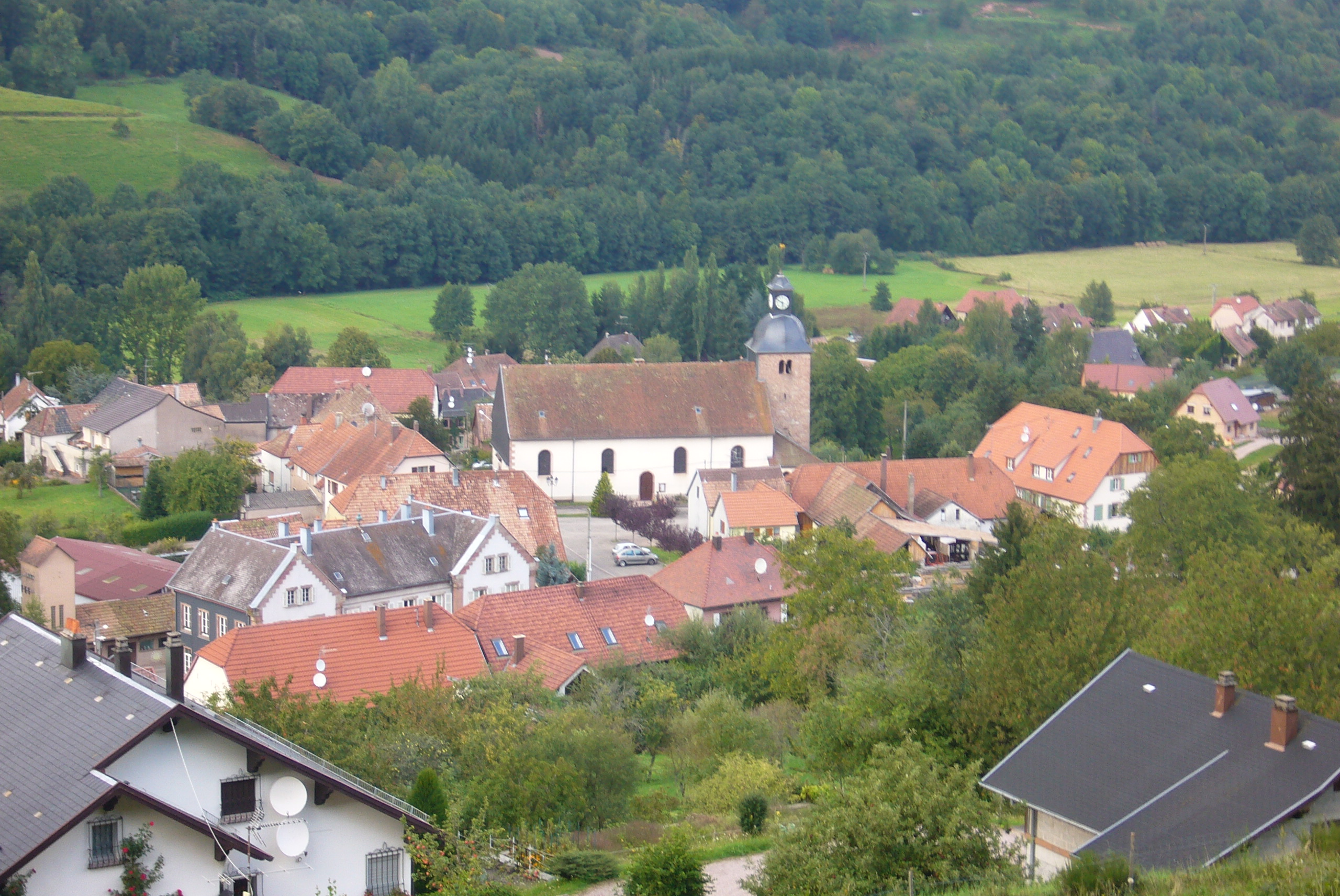 Vue sur le village de Fouchy depuis le réservoir